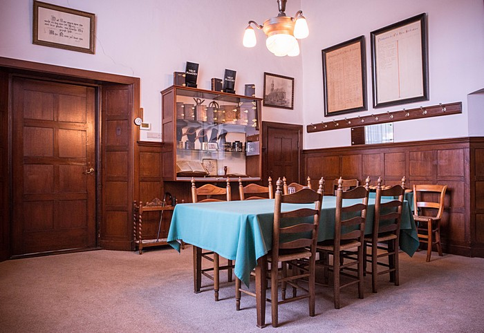 De gerfkamer van de Grote Kerk te Nijkerk